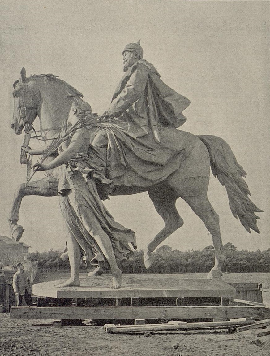 Reiterstandbild Kaiser Wilhelms I. vom Kaiser-Wilhelm-Nationaldenkmal. Bildhauer: Reinhold Begas